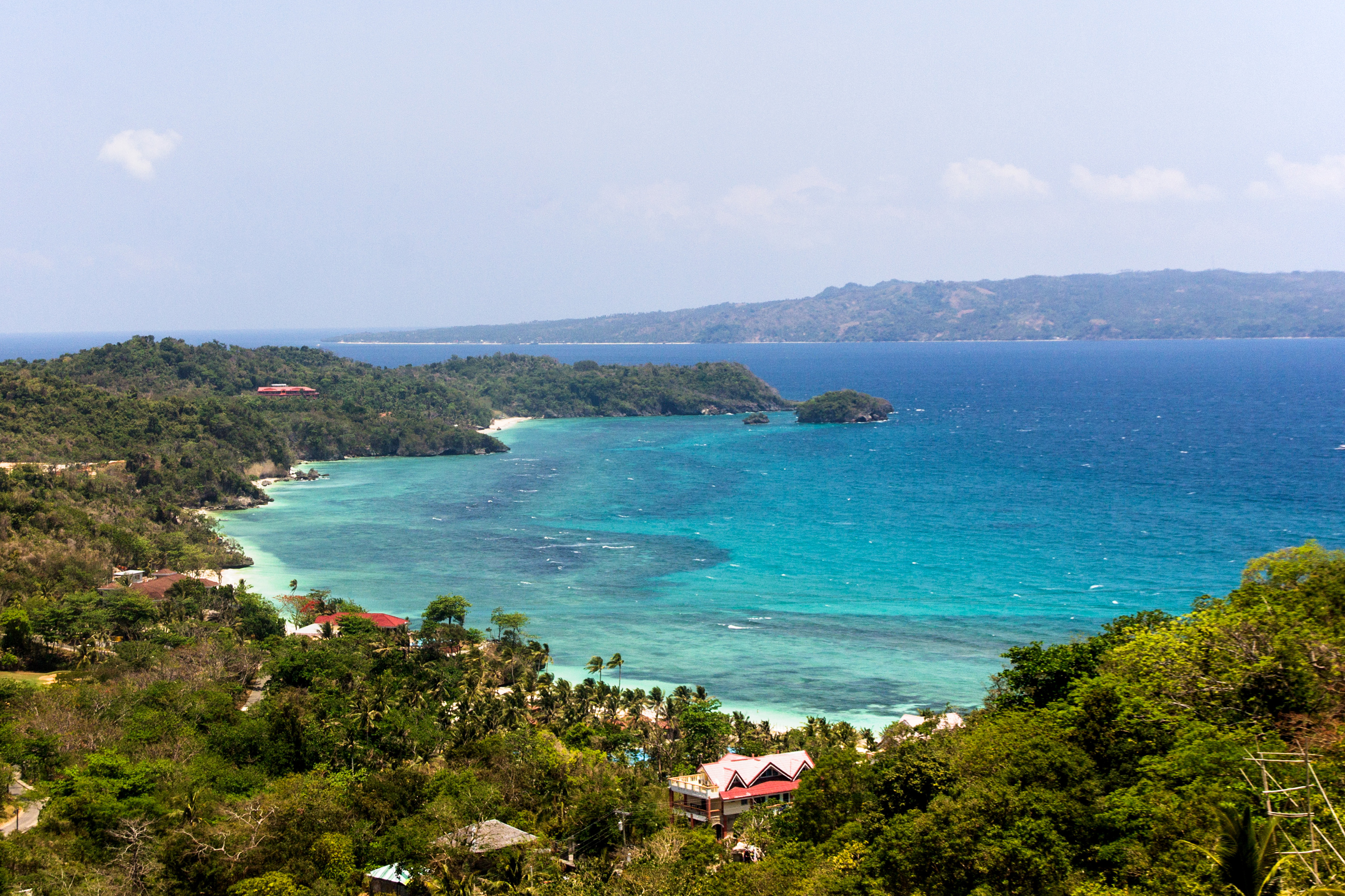 Boracay Island, Philippines